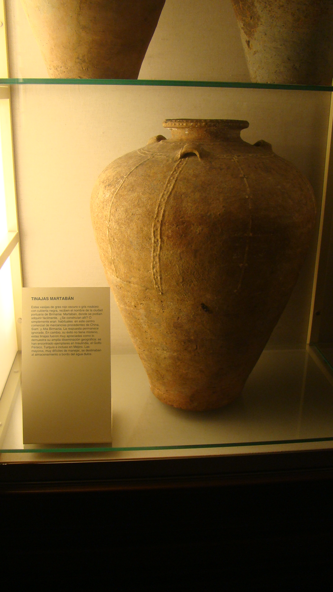 Museo Naval de Madrid, España.